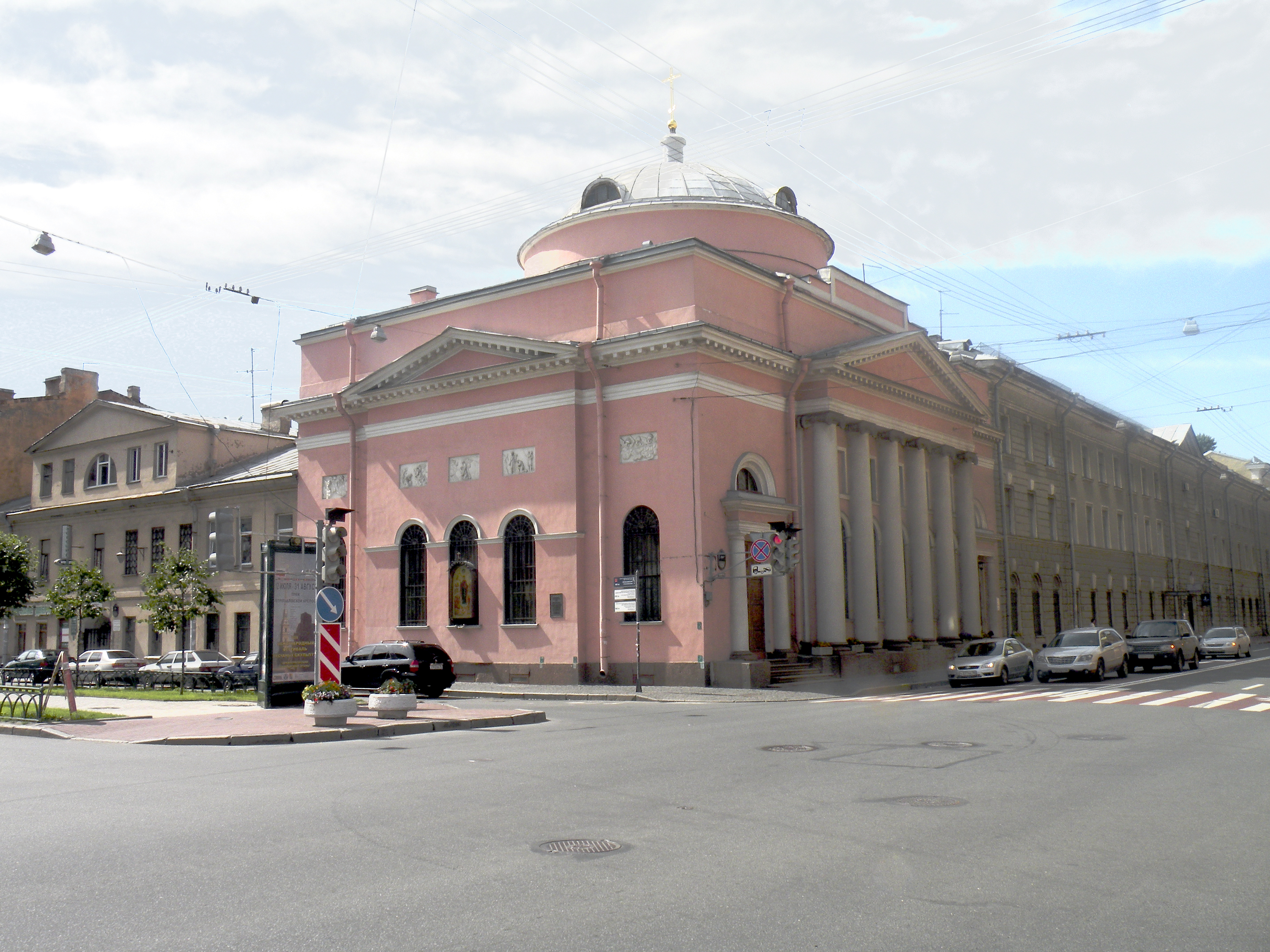 Церковь Божией Матери всех скорбящих радости на Шпалерной